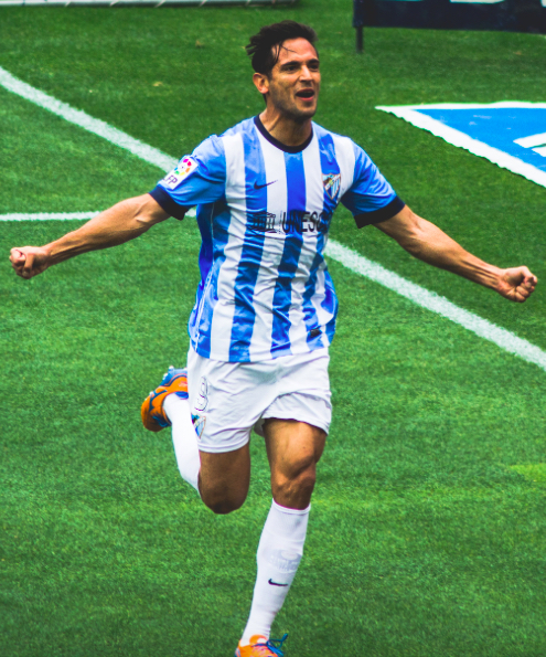 Santa Cruz, Málaga CF, España.